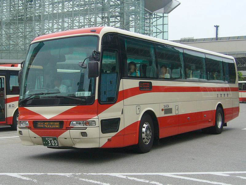 登録番号 石川200か・303 北陸鉄道所属 北陸道特急バス用 2006年6月23日 金沢駅前にて撮影